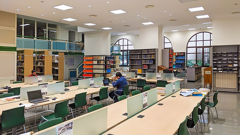 Students working in the library